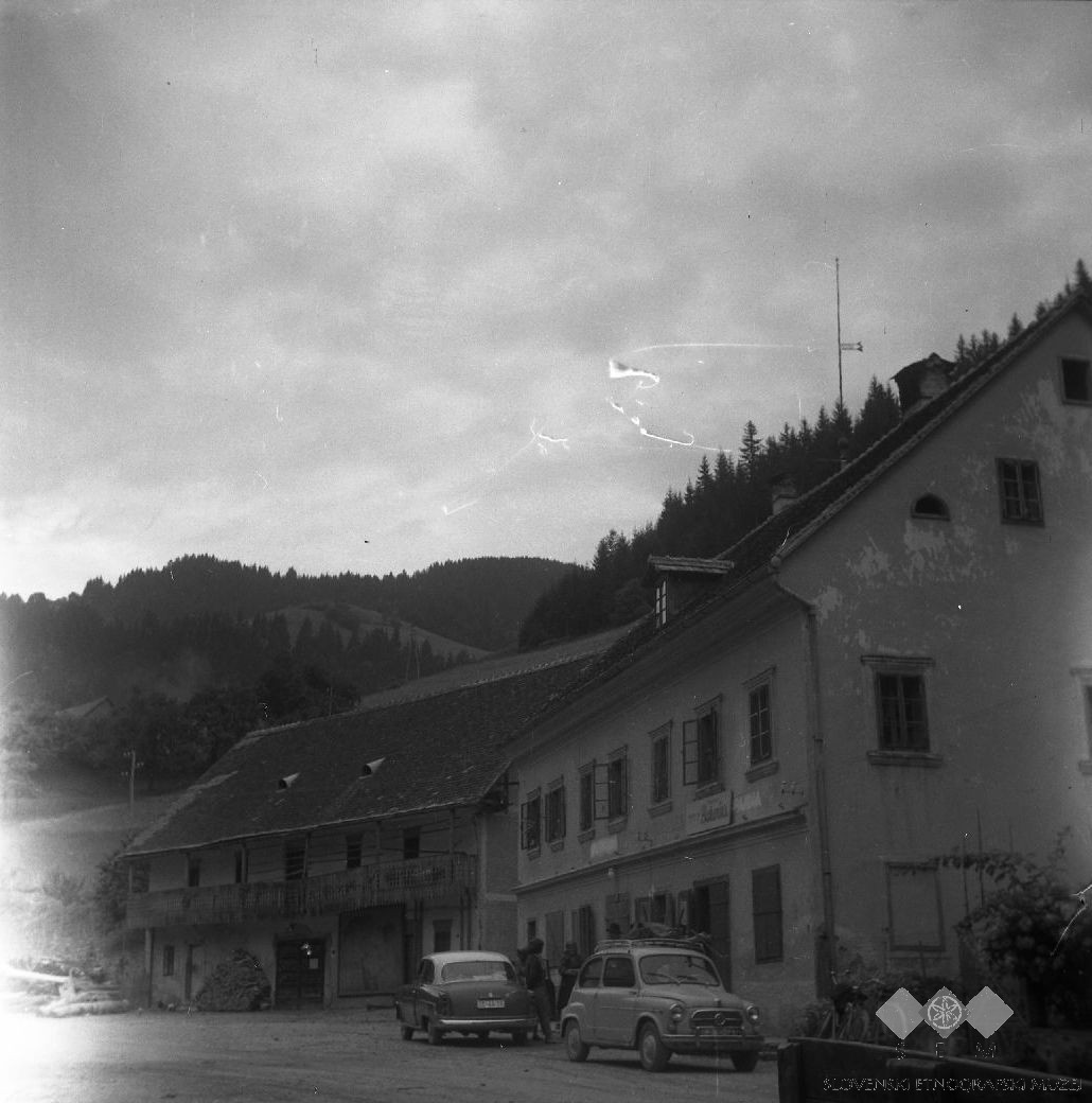 Nekdanja Tijekova furmanska gostilna v Boharini pri Zrečah.